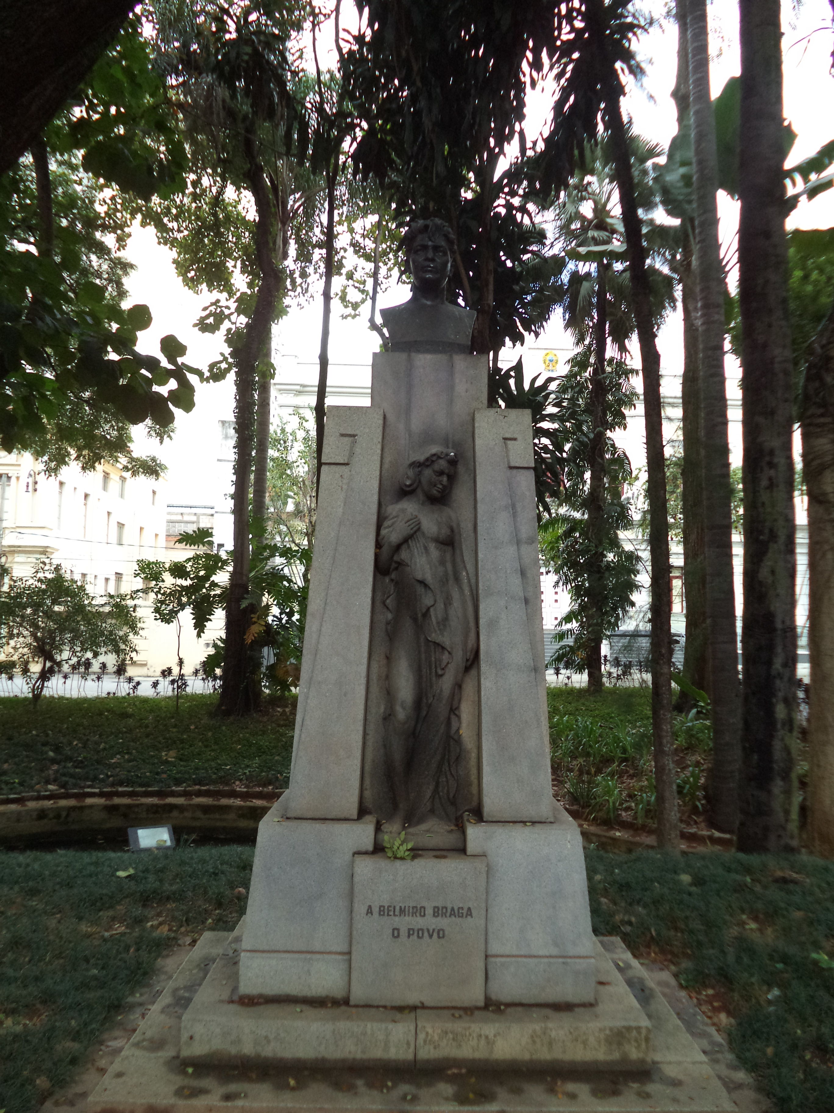 Estátua de Belmiro Braga em Juiz de Fora.